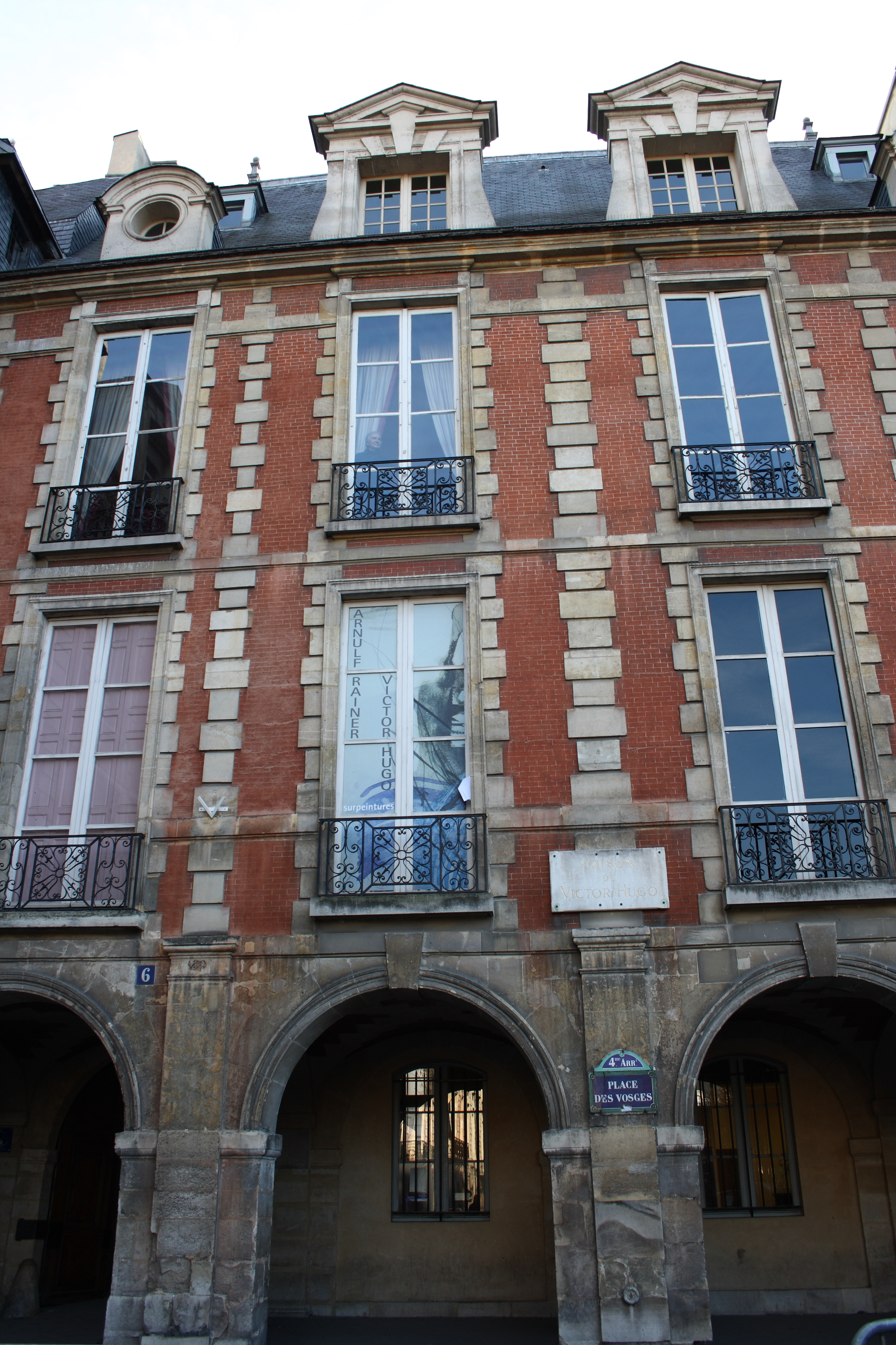 Maison de Victor Hugo in Paris, 6 place des Vosges